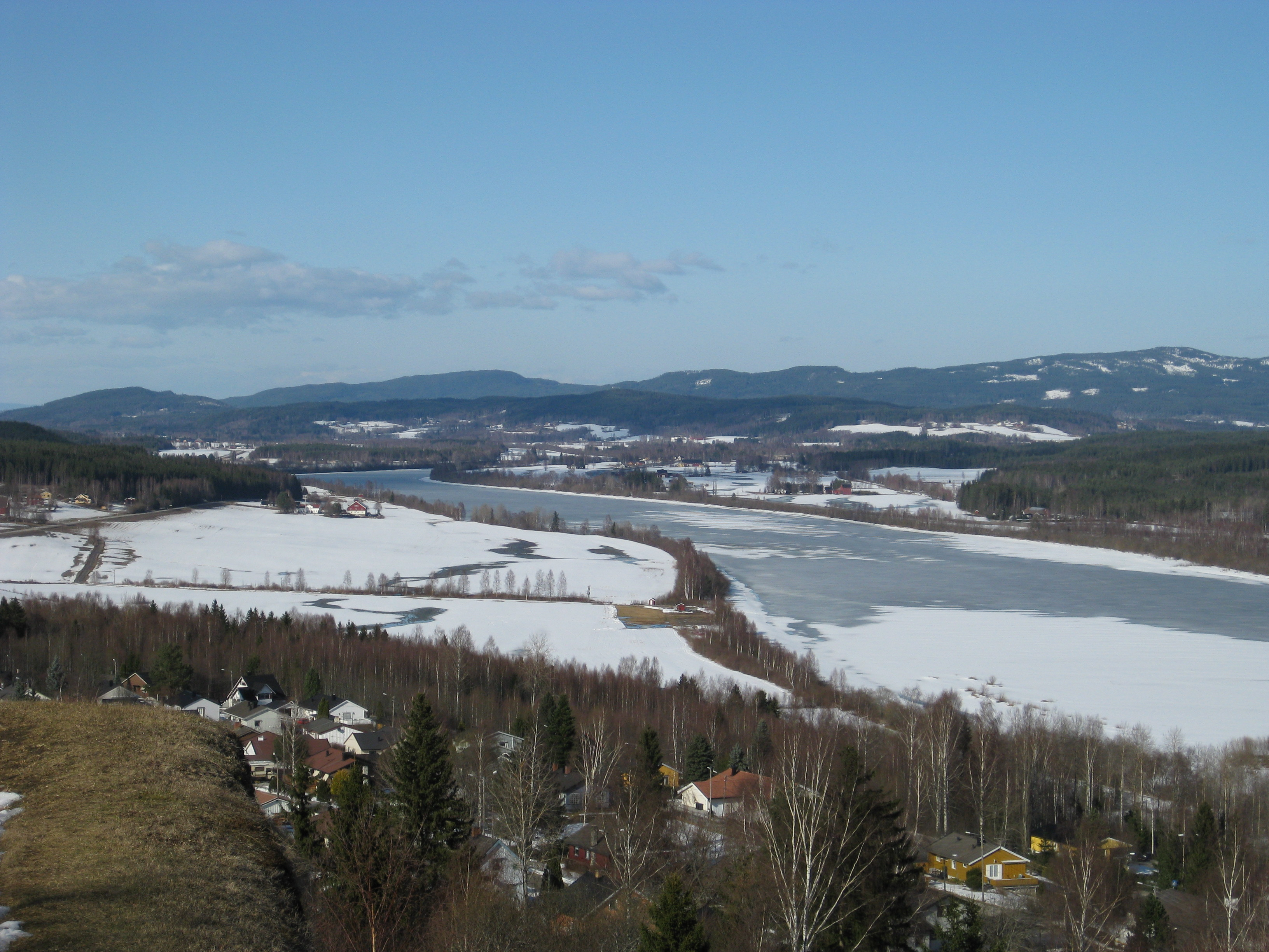 Glomma sett nordover fra Kongsvinger festning